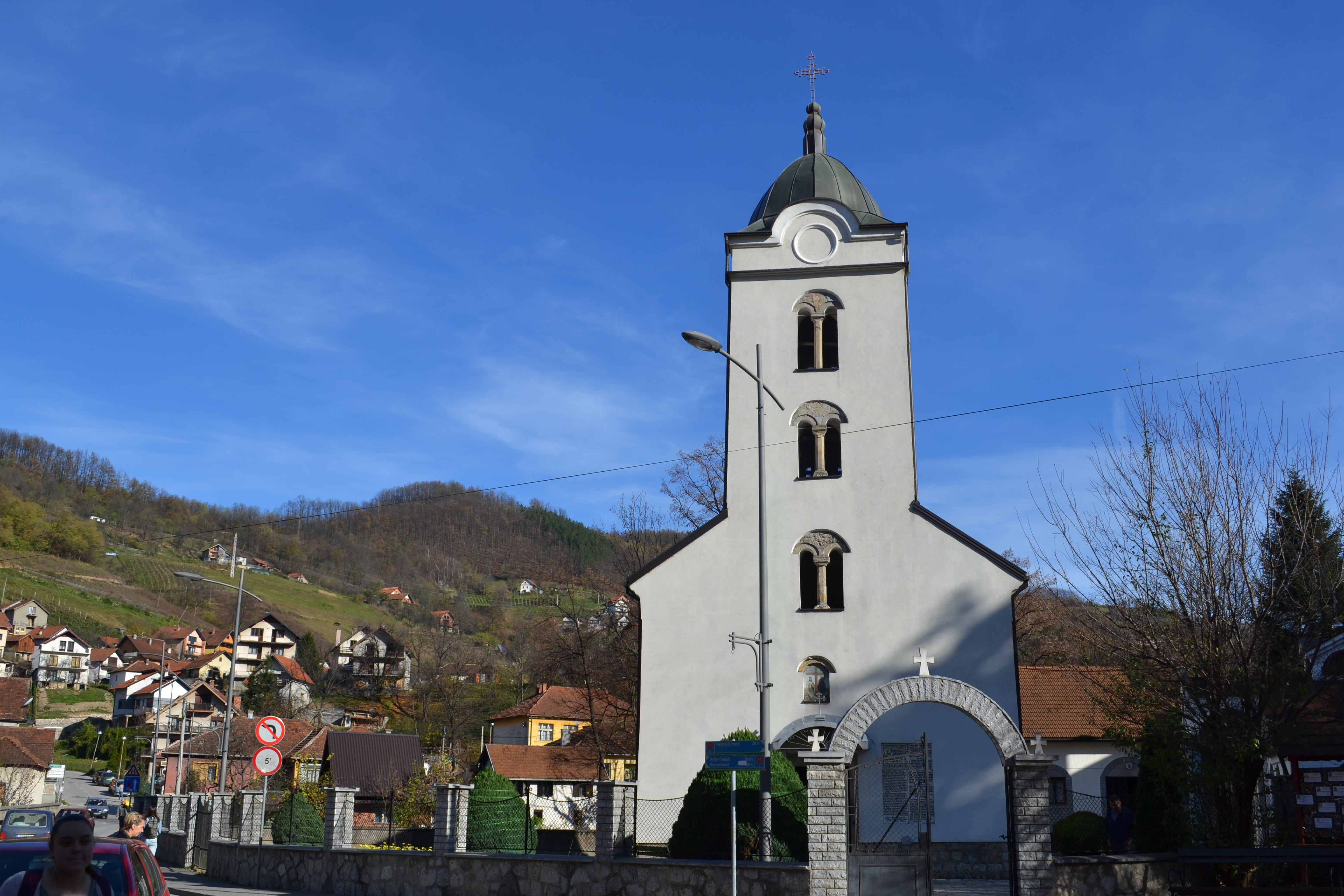 Crkva Sv. cara Konstantina i carice Jelene u Ivanjici